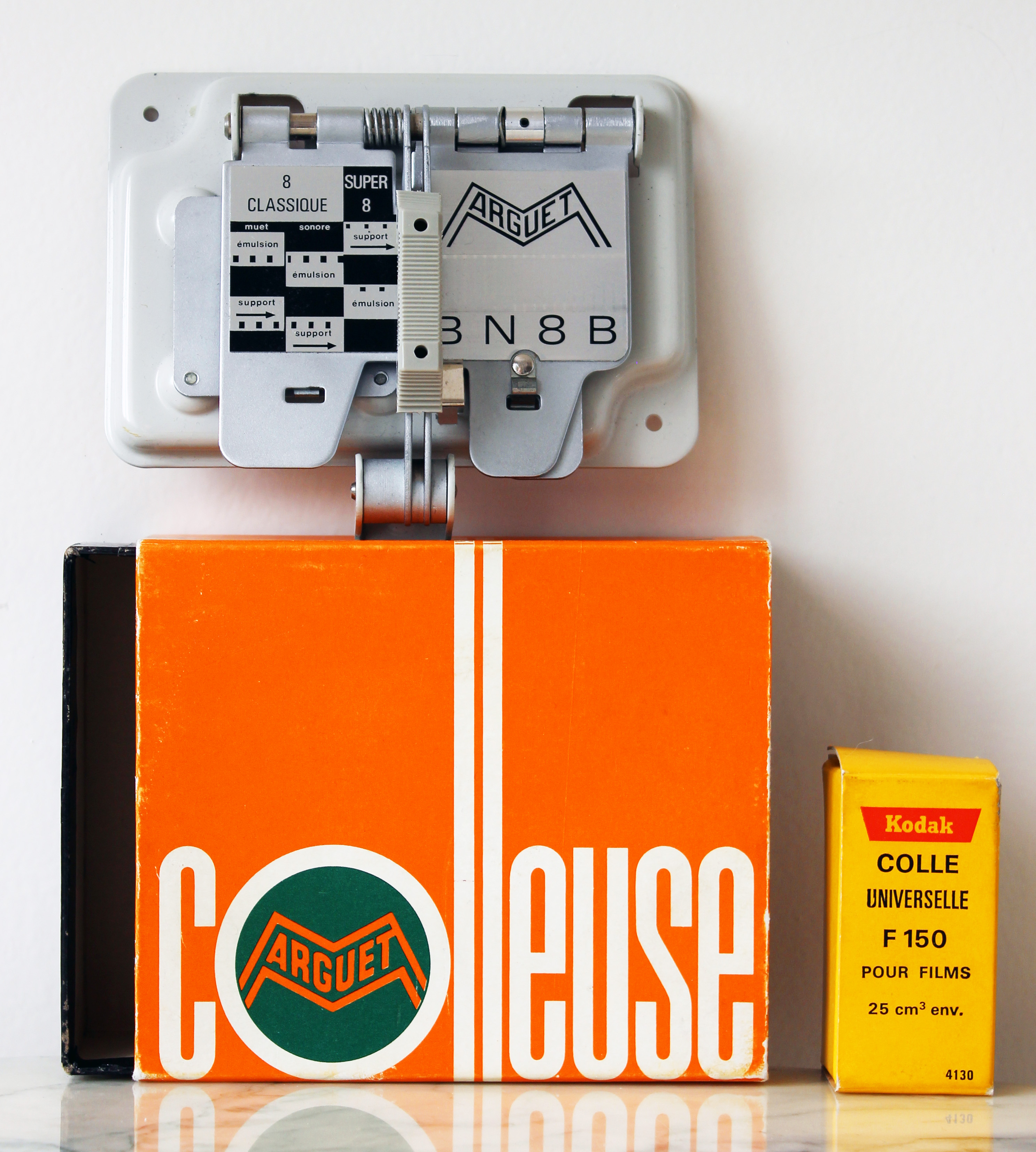 Presse à coller Marguet 8mm & Super8 (1970). Boîte et flacon de colle Kodak.